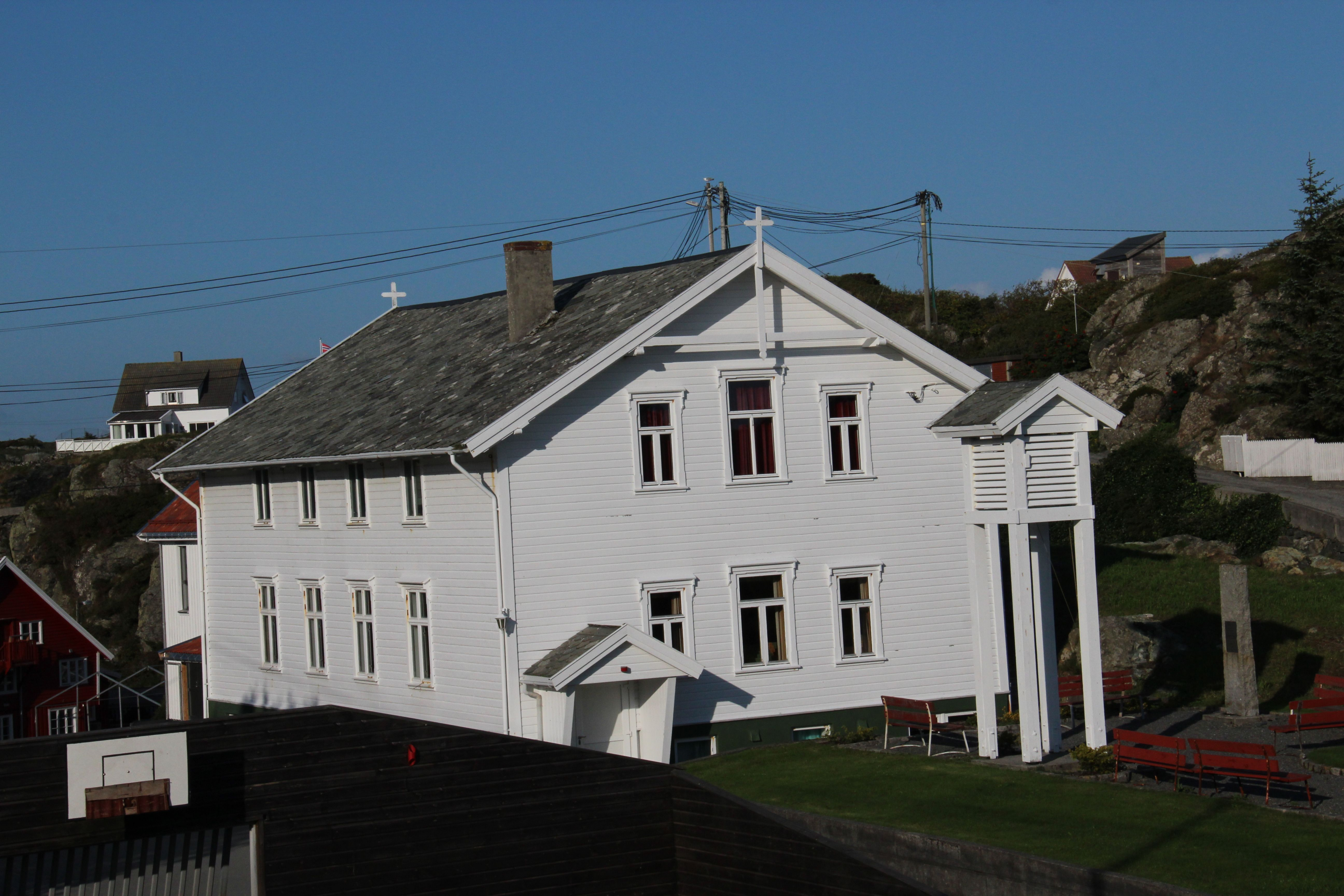 Røvær bedehuskapell. Foto: Bertha Aarø, fra Riksantikvarens Kulturminnesøk